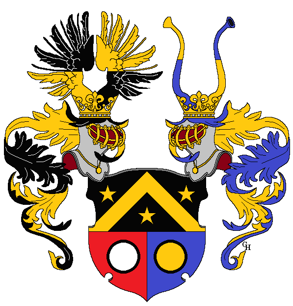 Wappen des deutsch-österreichischen Unternehmers und Optikpioniers Friedrich Voigtländer (1812–1878), verliehen anlässlich seiner Erhebung in den österreichischen Ritterstand 1868. Zeichnung von Gerd Hruška ( Für weitere Informationen zu dieser Standeserhebung siehe (